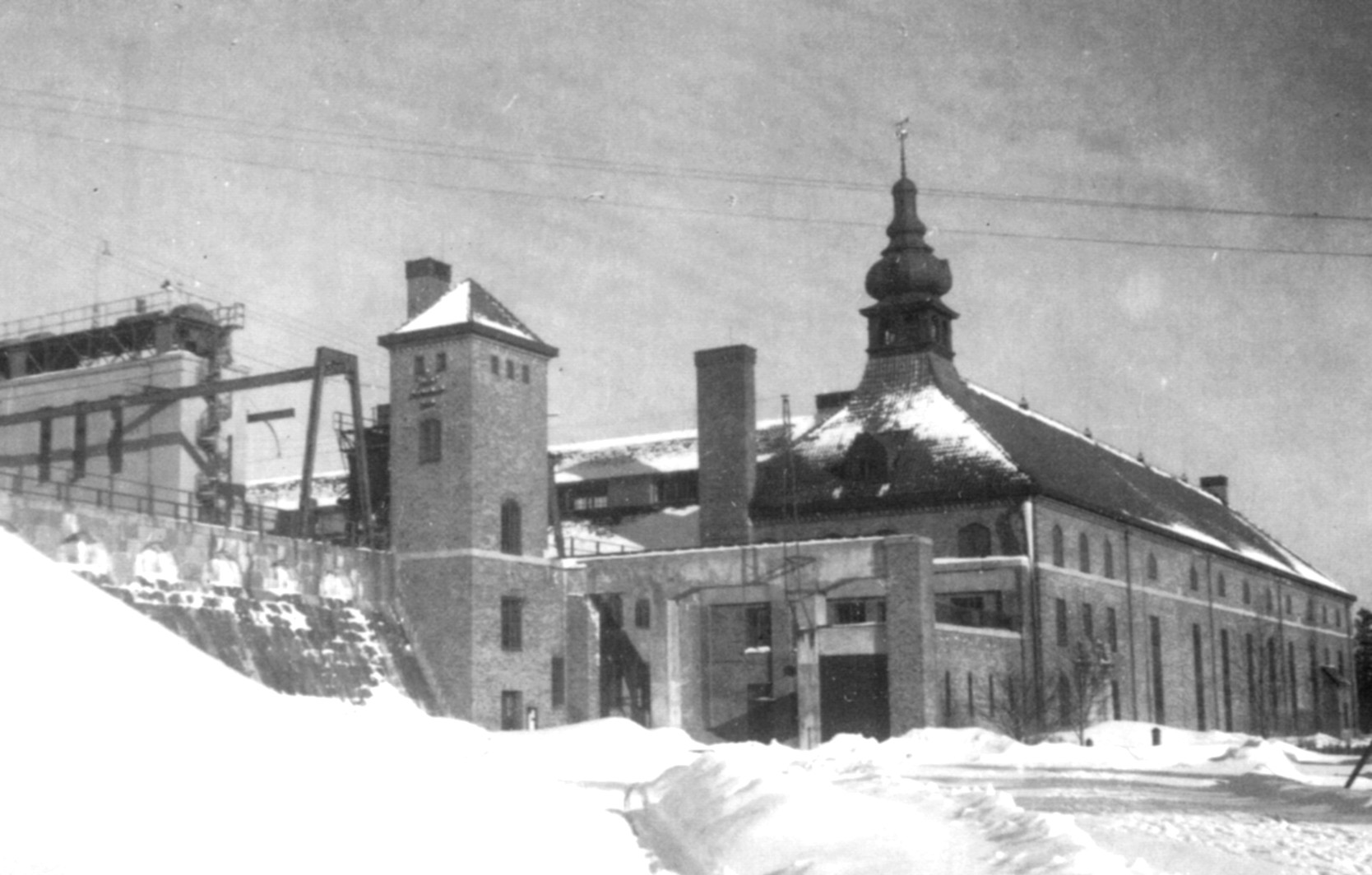 Untraverket